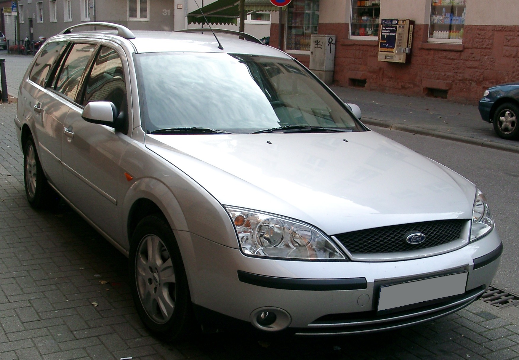 Ford Mondeo II Turnier